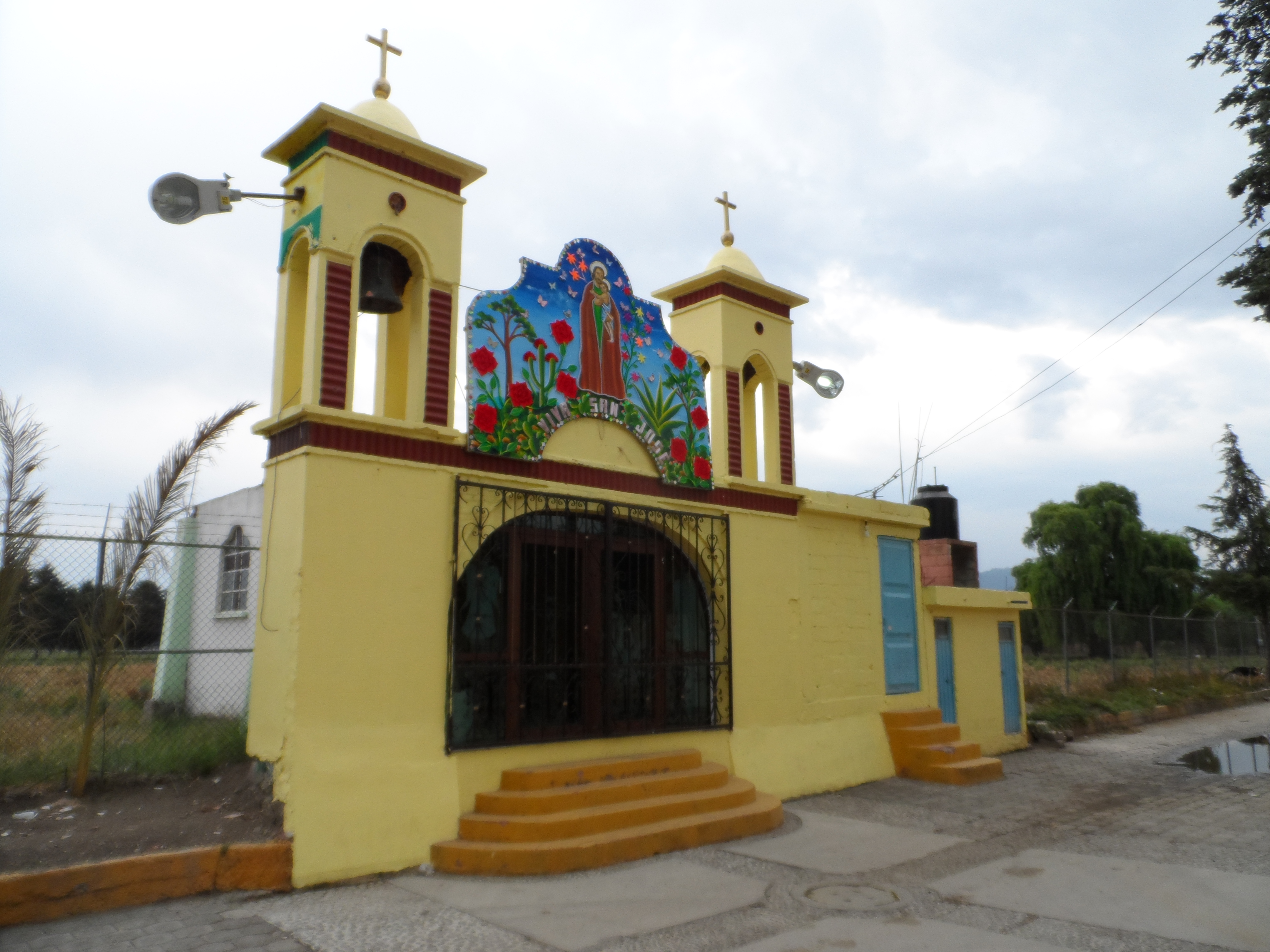 Capilla de San Jose